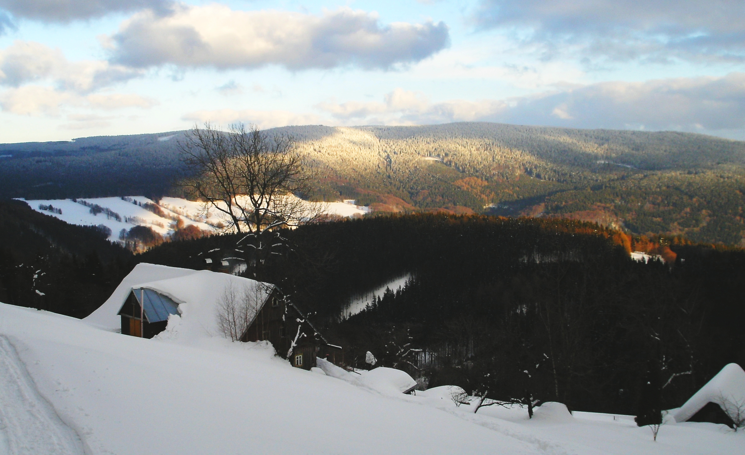 Das Rehorngebirge mit Rehornbaude im Winter (Blick über das Aupatal)